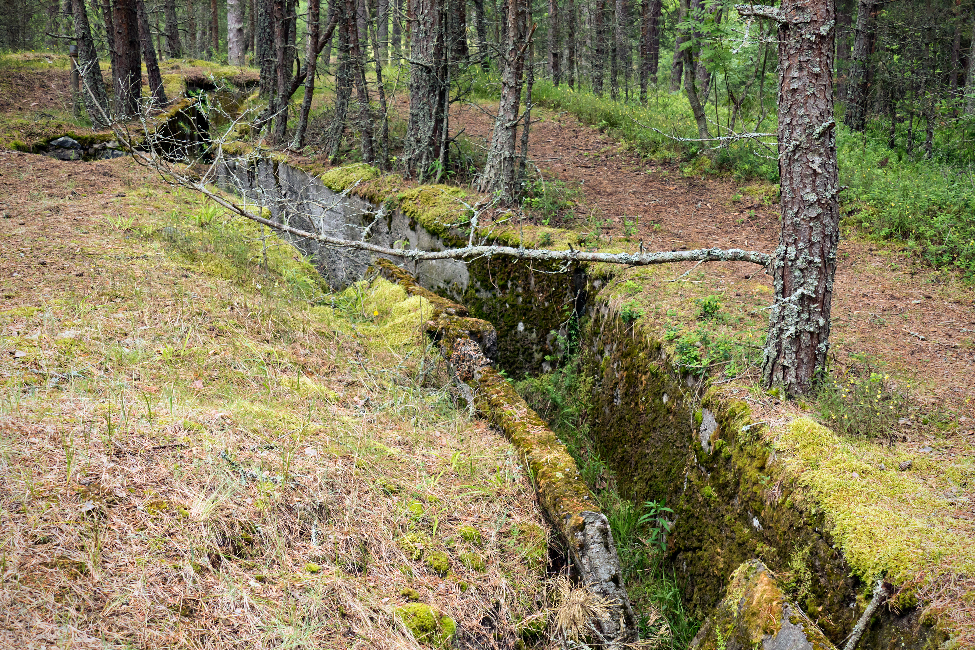 Kaitsekraav Tahkuna poolsaarel, Kukeraba kaitsepatarei juhtimiskeskuse lähedal.